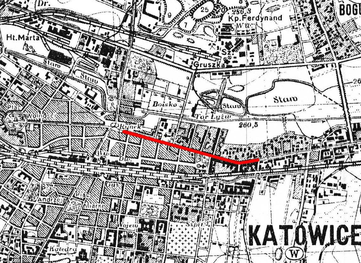 Mapa ulicy Warszawskiej w Katowicach (zaznaczona czerwoną linią) na fragmencie mapy Wojskowego Instytutu Geograficznego w Warszawie z roku 1933 (PAS 47 - SŁUP 28 - H)